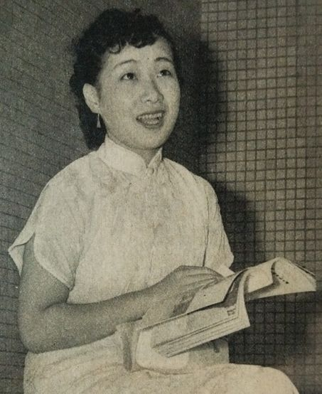 寺島信子